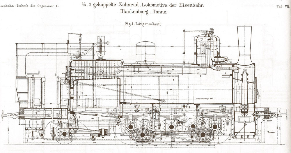 Typenskizze einer Zahnradlokomotive der Harzbahn Blankenburg–Tanne